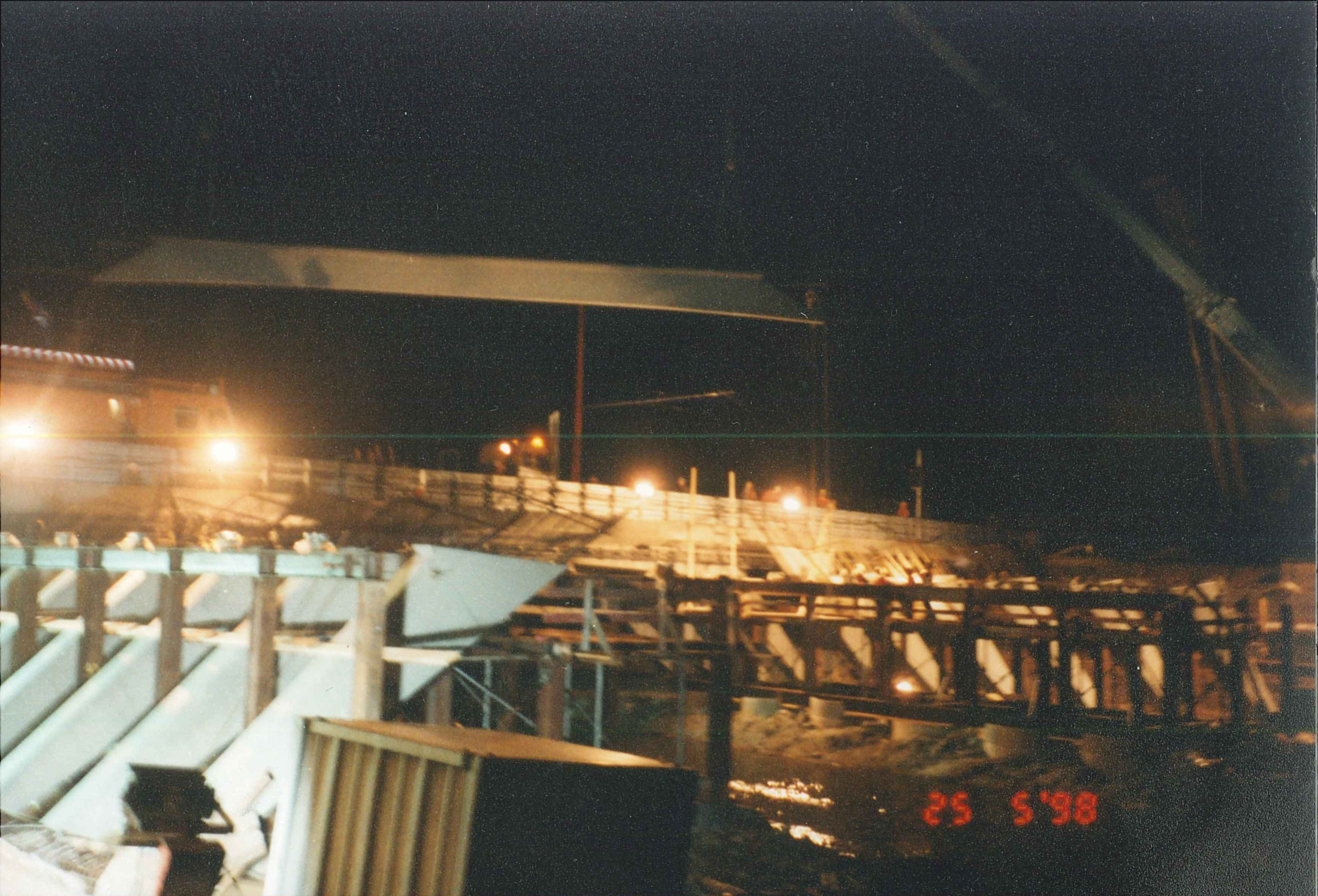 Montage der Fertigteilträger durch zwei 400t Autokrane